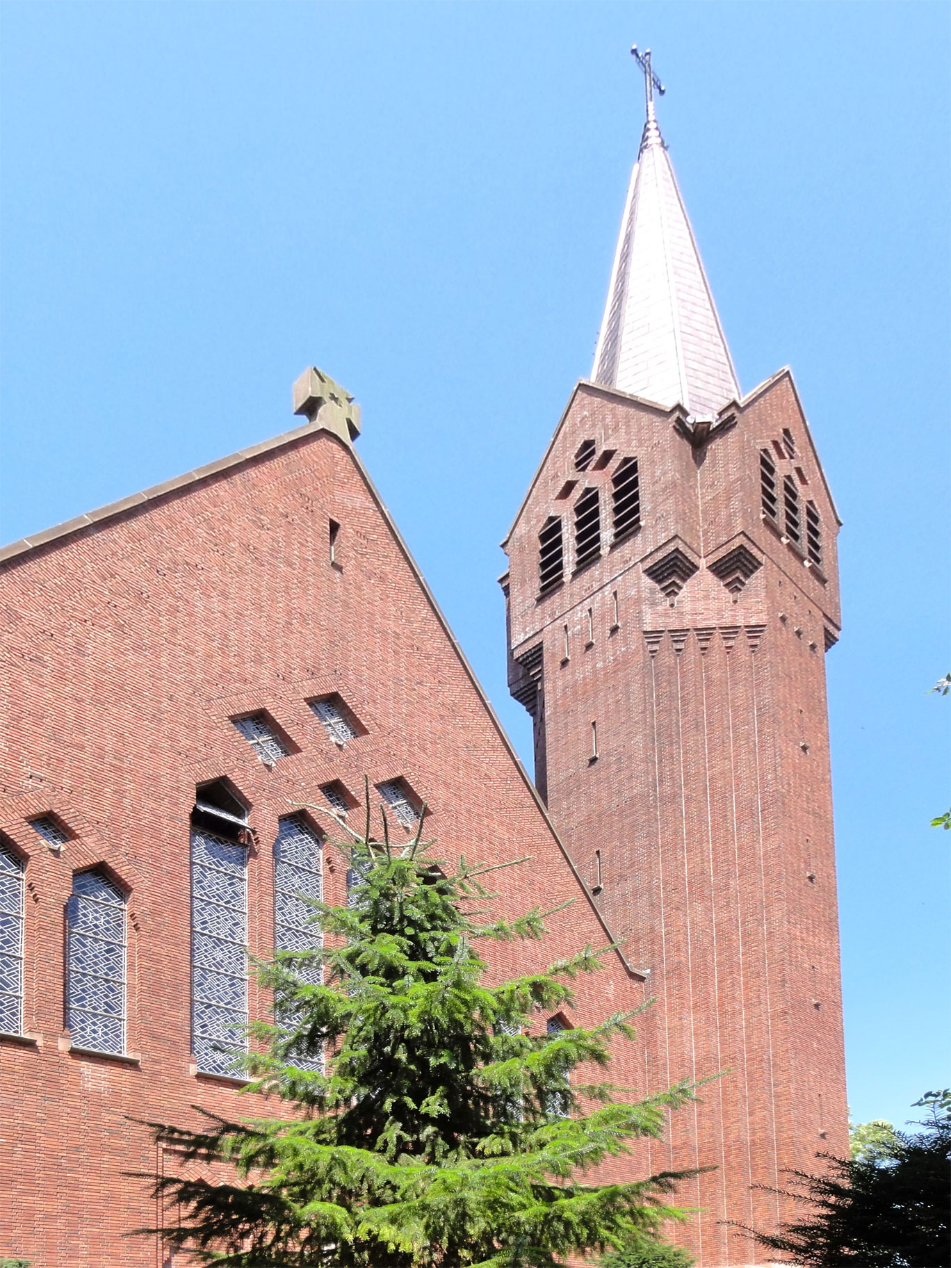 Sint-Franciscuskerk in Bolsward